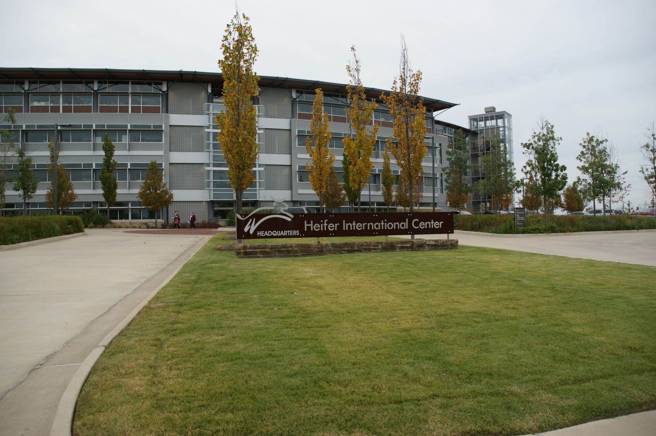 Główna siedziba fundacji Heifer International, Little Rock, Arkansas, 2010